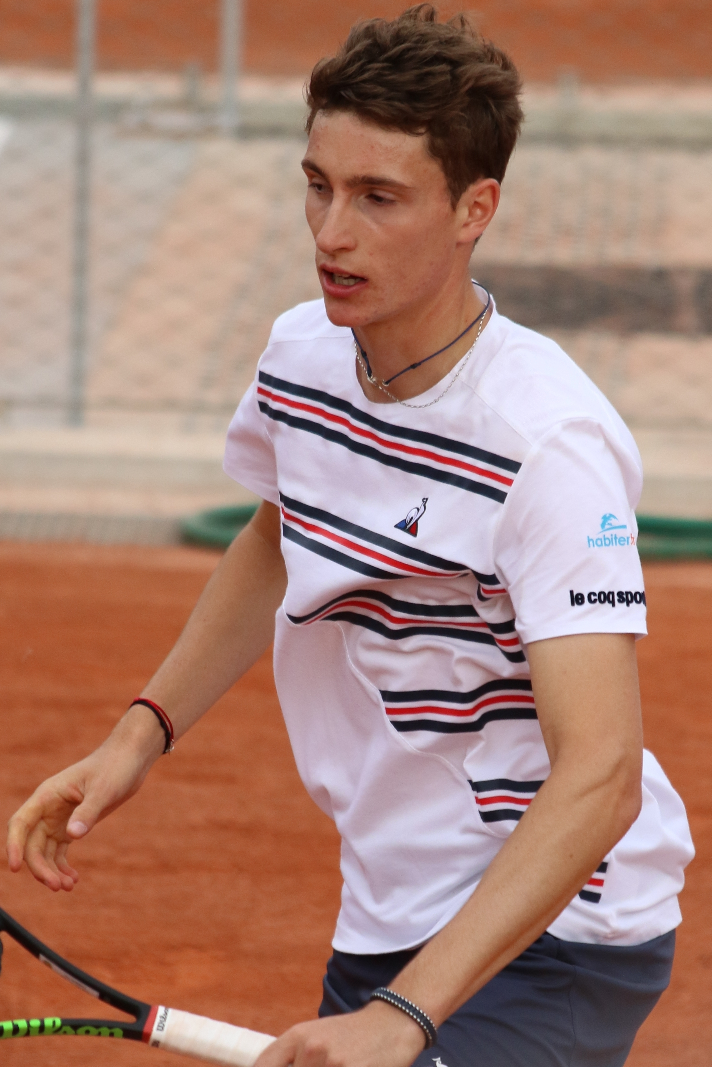 Humbert RG19 (7)